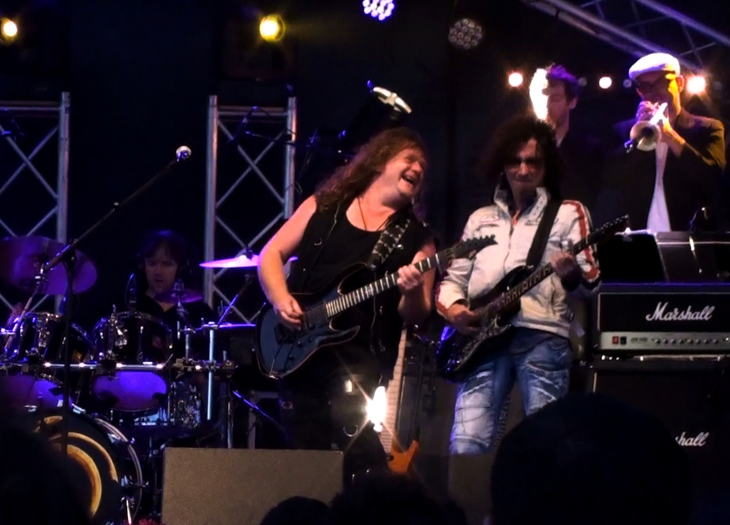 Fred Moreau, Pat O'May et Norbert Krief lors d'un concert à Hillion en 2011.